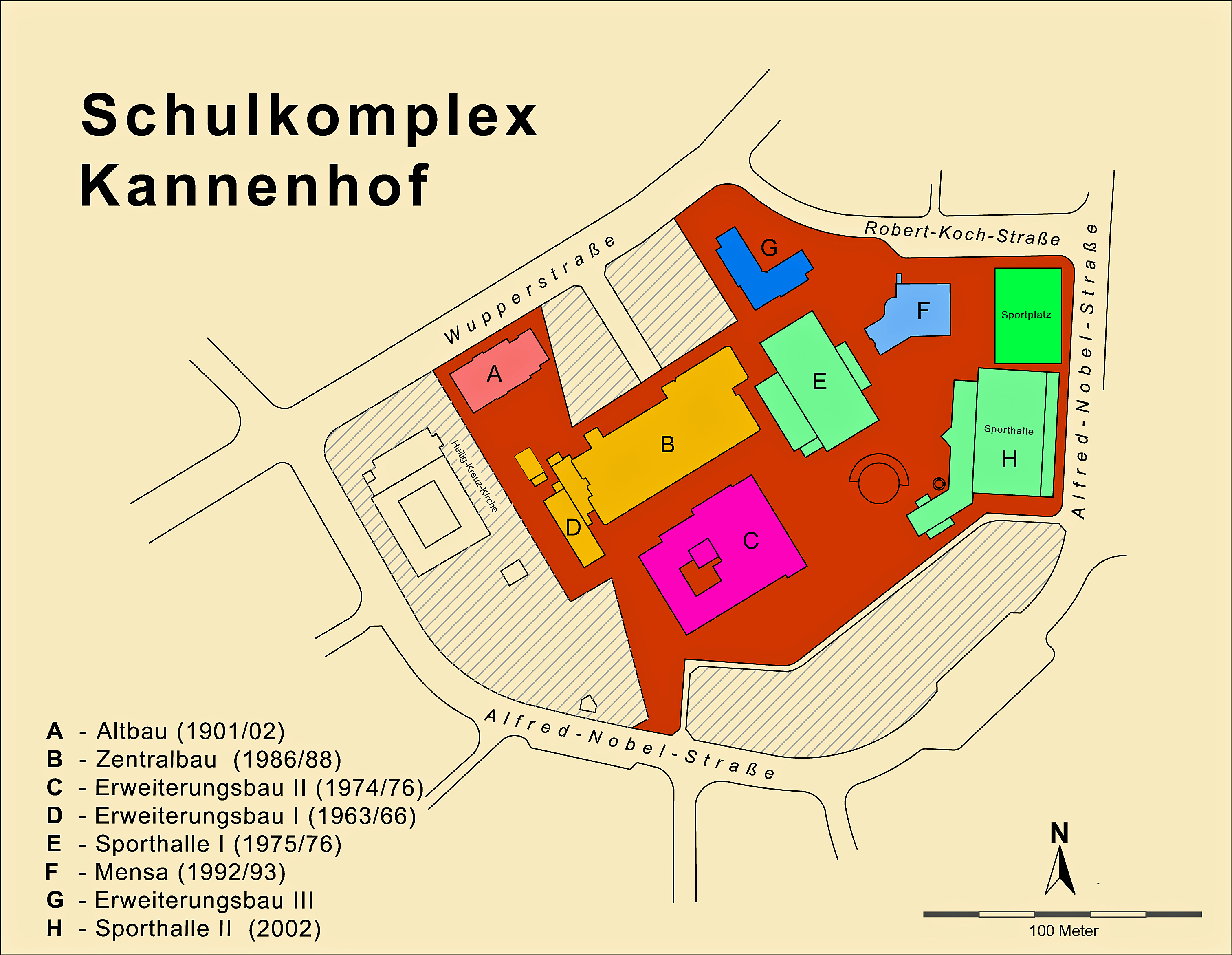 Lageplan der Gesamtschule Kannenhof (Städt. Gesamtschule Solingen).